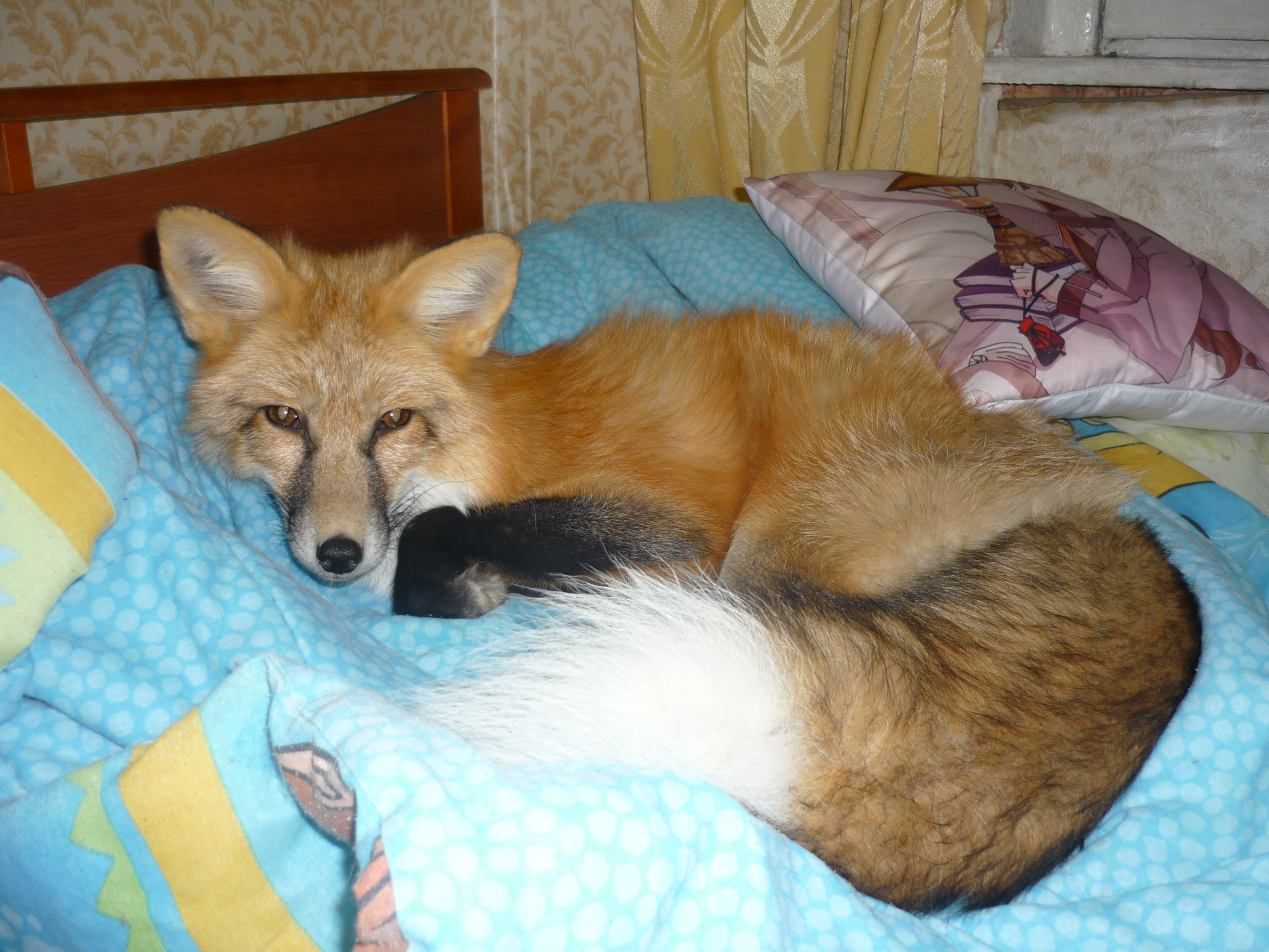 Домашняя лиса Адисей